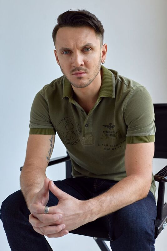 Максим Траньков